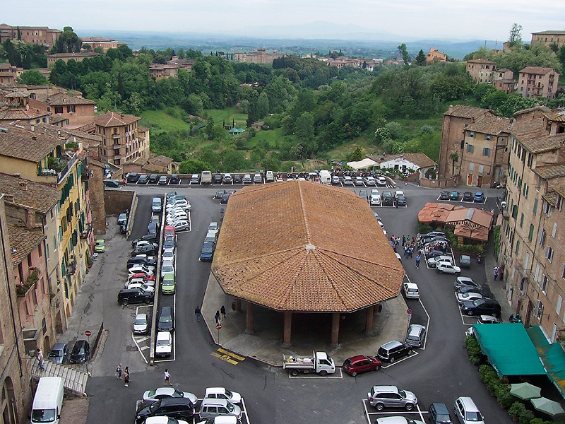 Siena - Piazza del Mercato